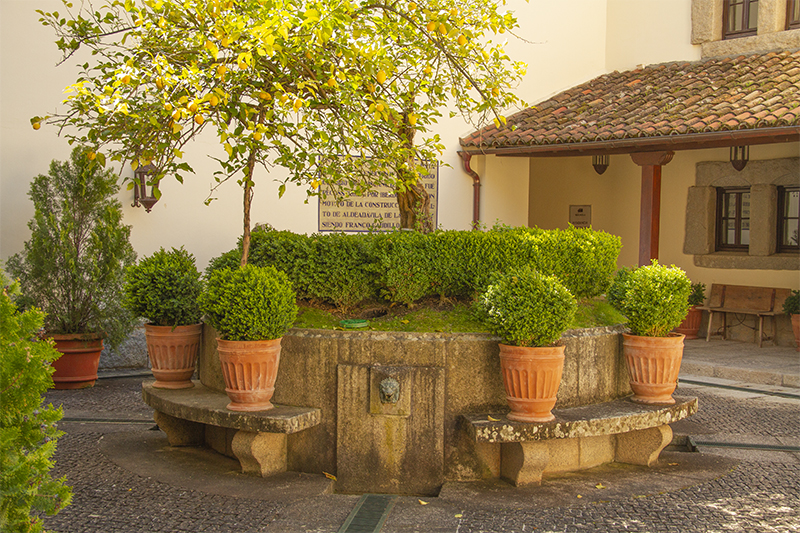 Claustro del Convento de La Verde, en la localidad del Salto de Aldeadávila, provincia de Salamanca, Castilla y León, España